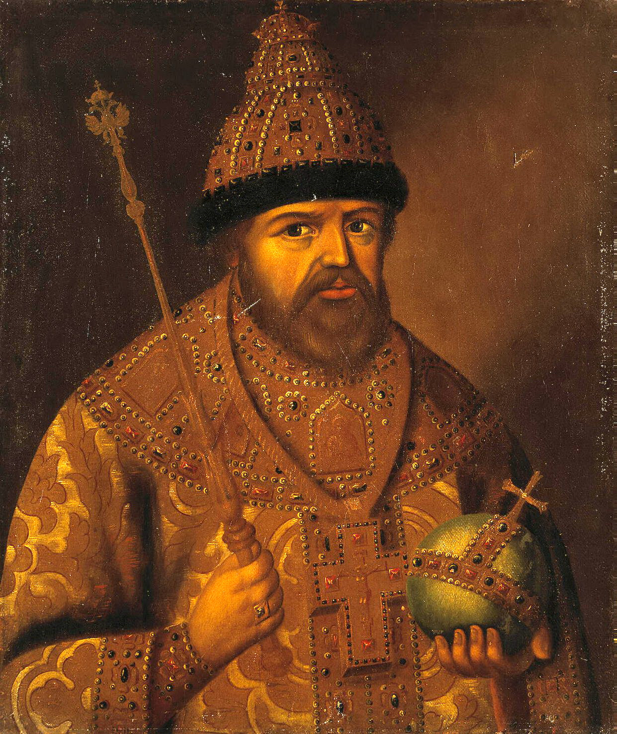 Портрет царя Алексея Михайловича